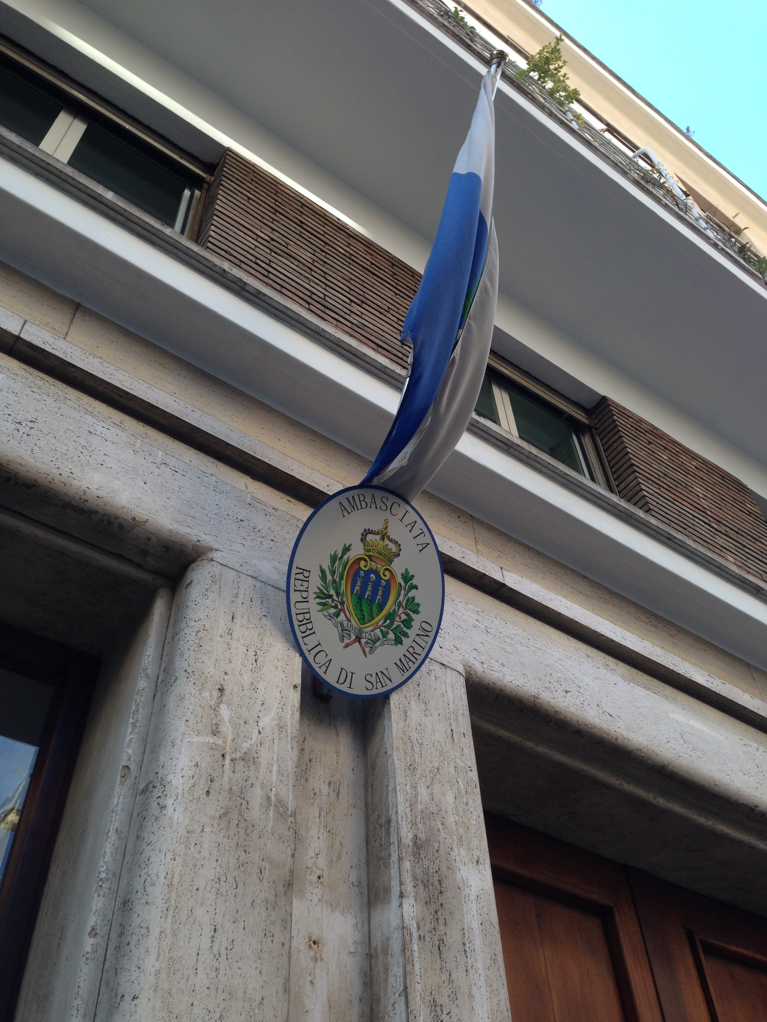 Ambasciata della Repubblica di San Marino e Rappresentanza Permanente della Repubblica di San Marino presso la FAO.